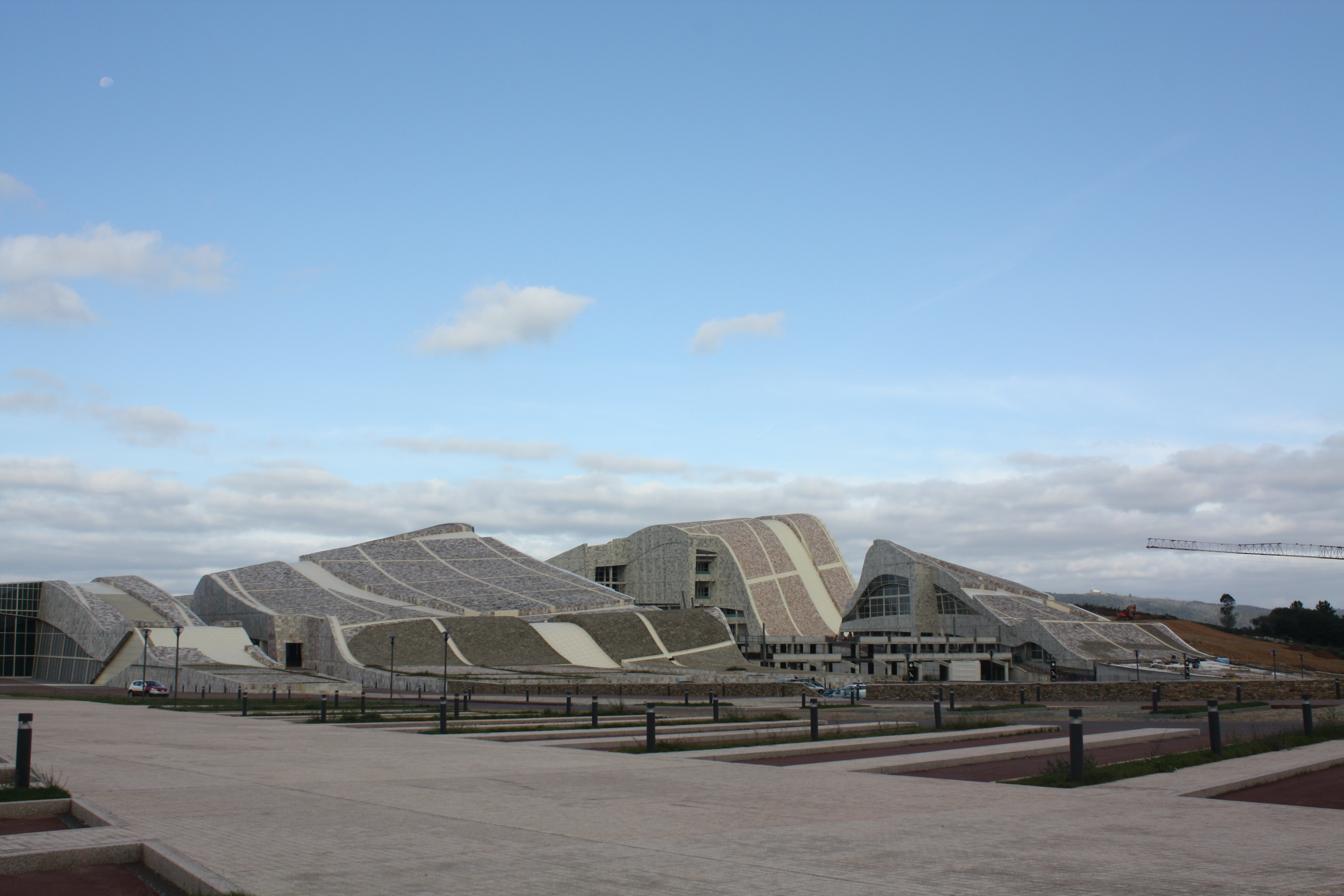 Cidade da Cultura. Vista xeral.